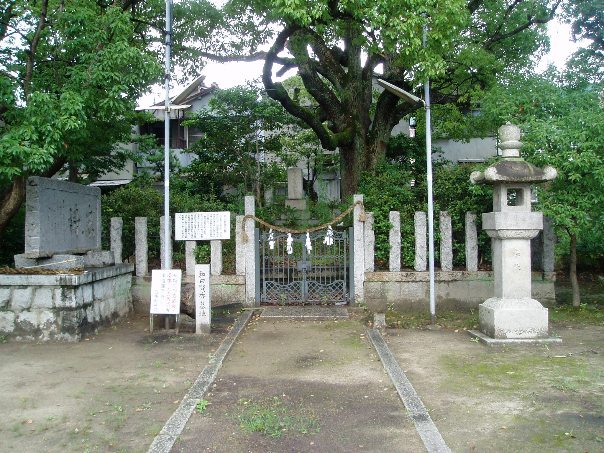 和田賢秀墓(大阪府四條畷市) Wada Kenshū Grave, Shijōnawate, Osaka, Japan 2006年7月29日撮影 撮影機材:OLYMPUS μ10 撮影者:Maechan0360